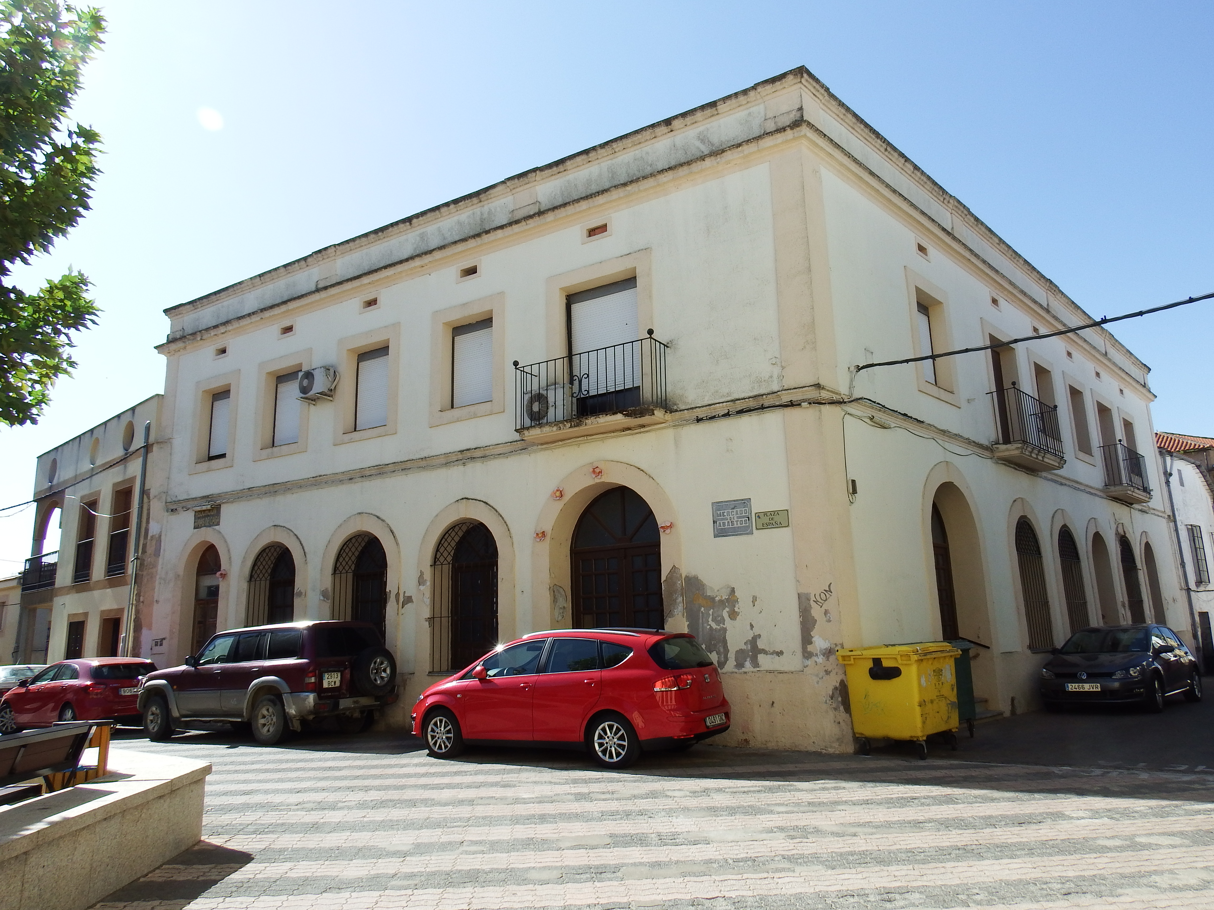 Zorita